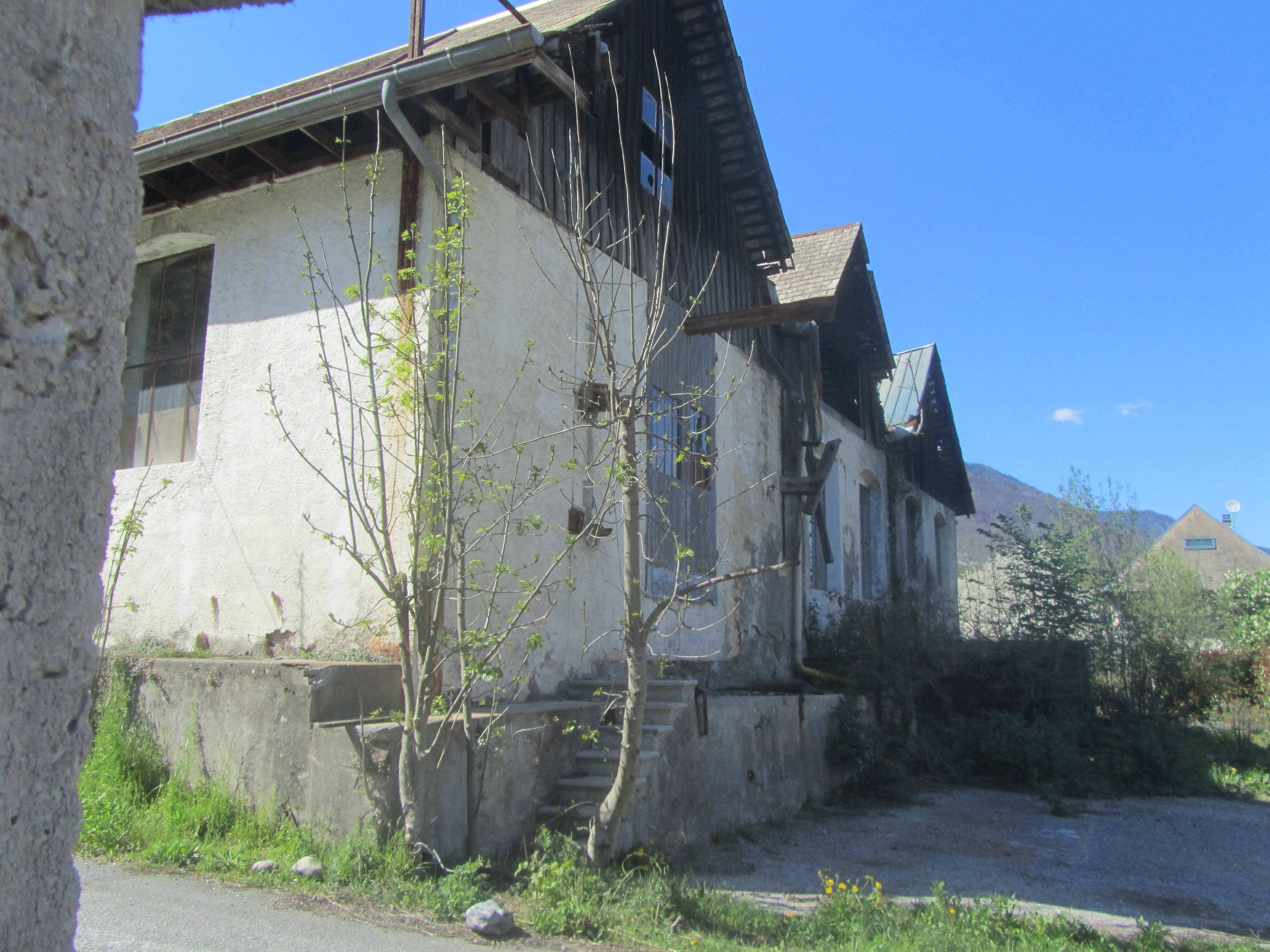 Les bâtiments de la râperie en bordure de la Lescherette, dont l’énergie hydraulique servait à la motorisation des machines.